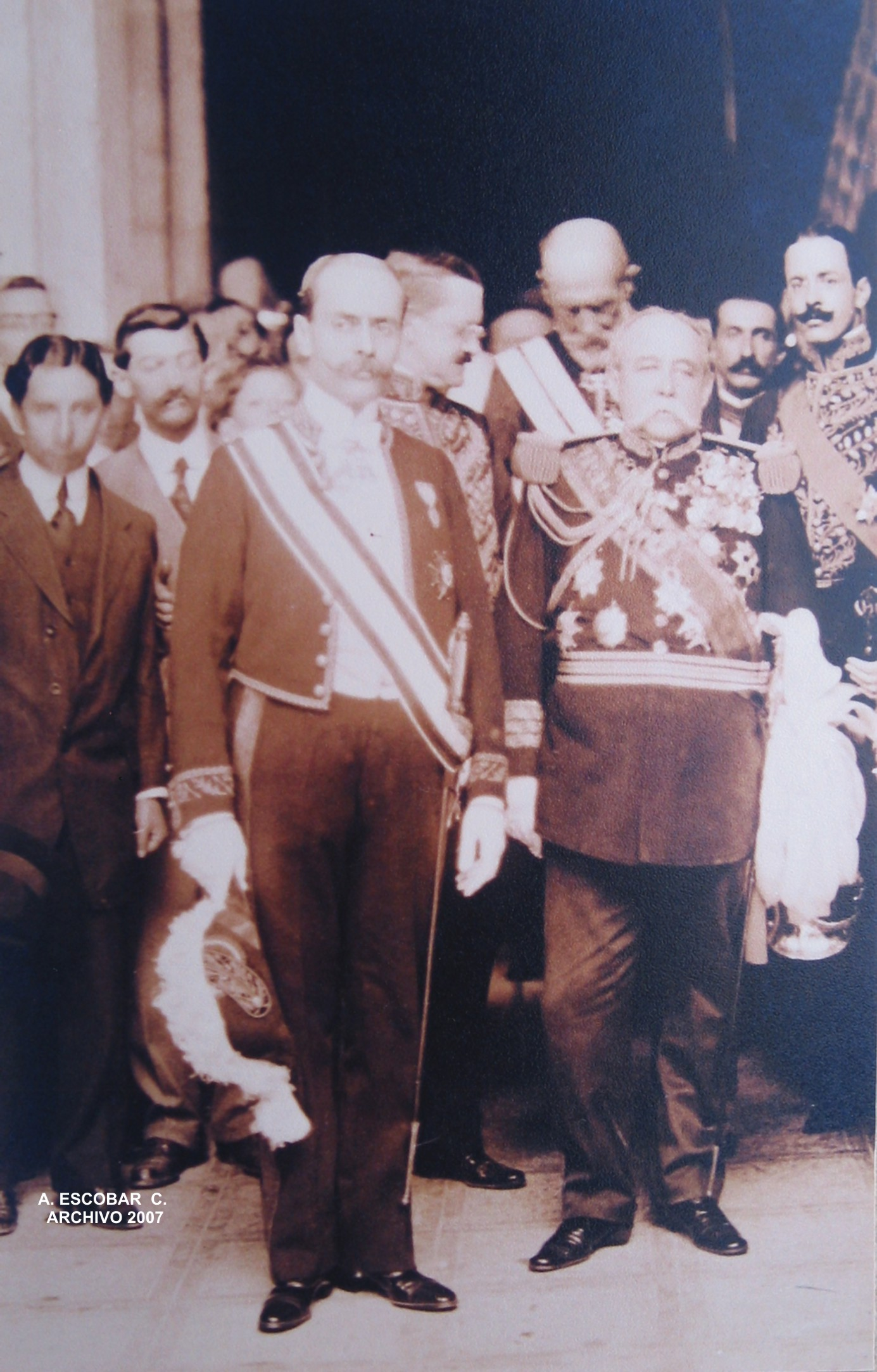 Mexican's centenial 1910, Camilo García de Polavieja spanish delegate